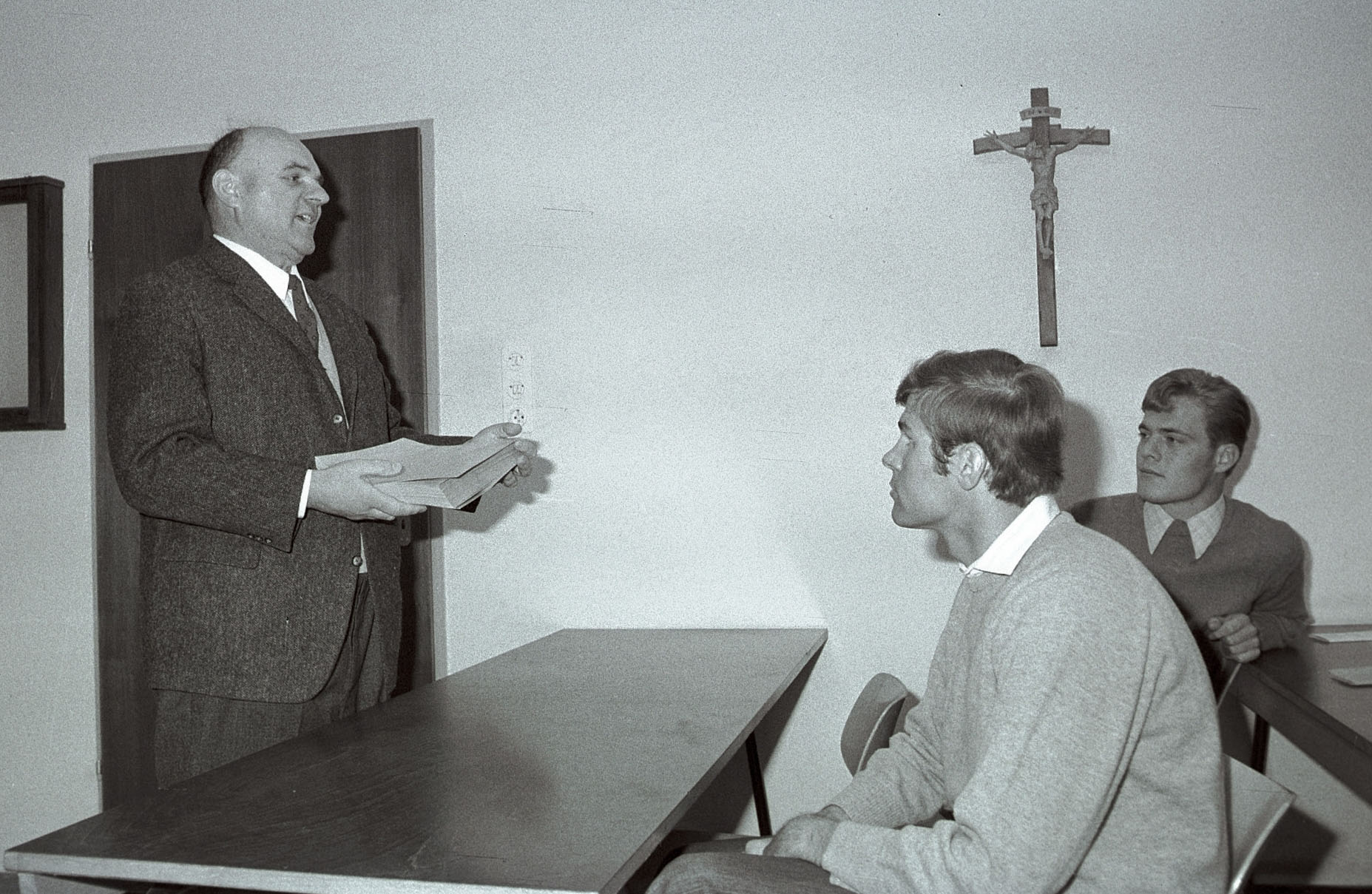 Lehrer und Schüler der Abiturklassen 1969/1970 des humanistischen Gymnasiums in Wolfratshausen-Waldram